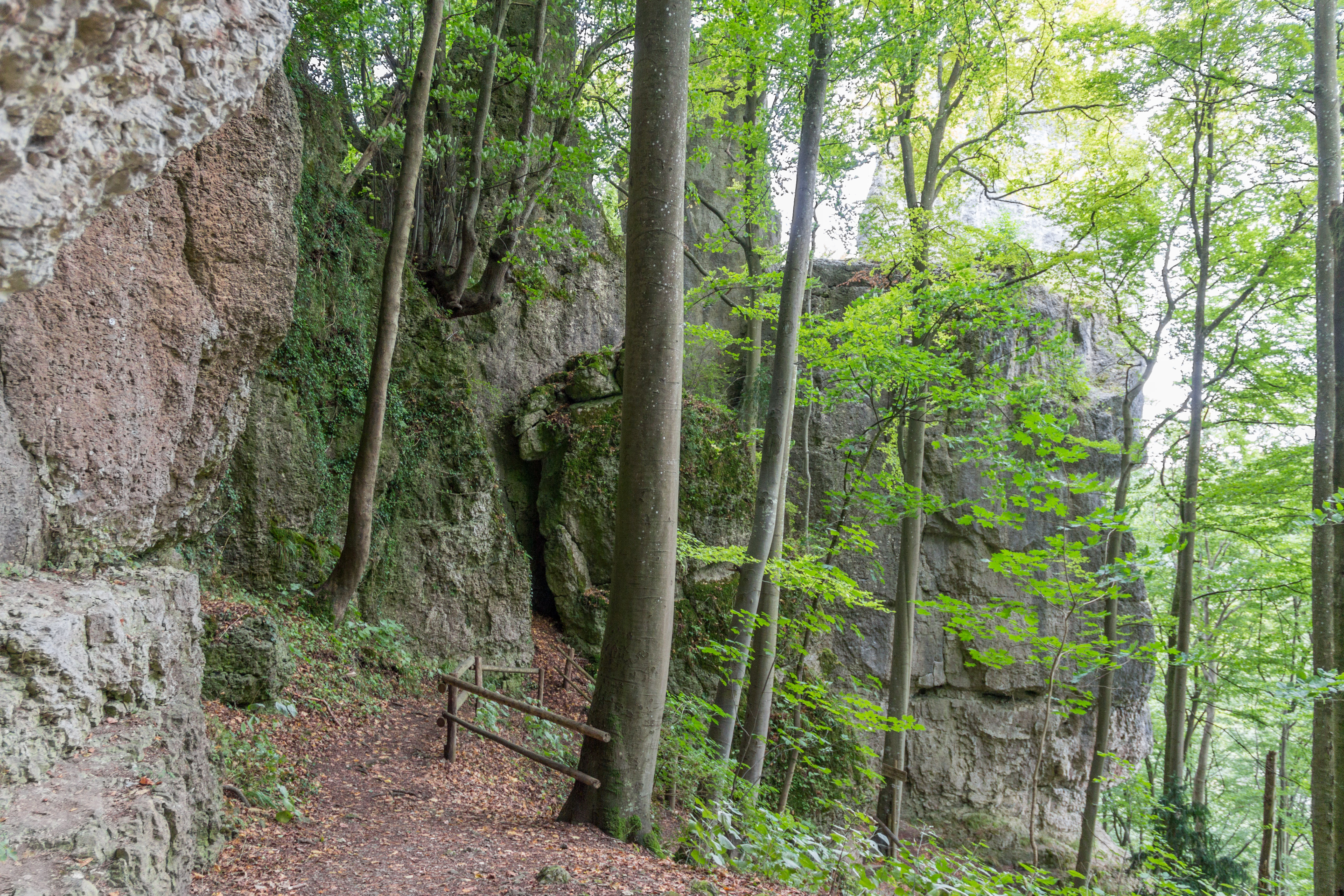 Napoleonsfels, Gößweinstein